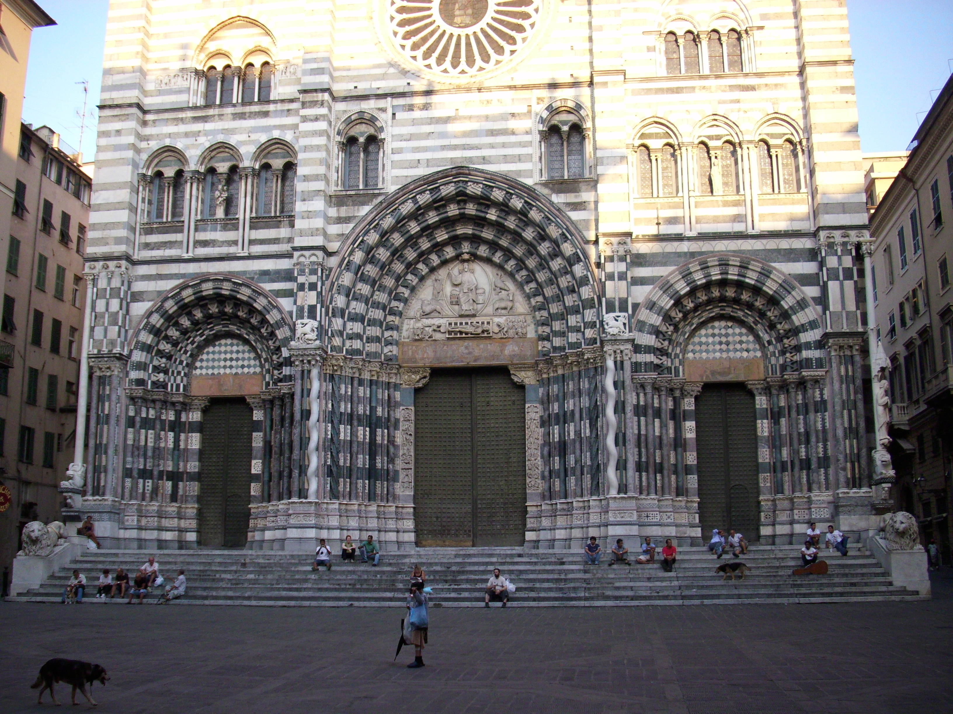 Chiesa di San Lorenzo a Genova, facciata